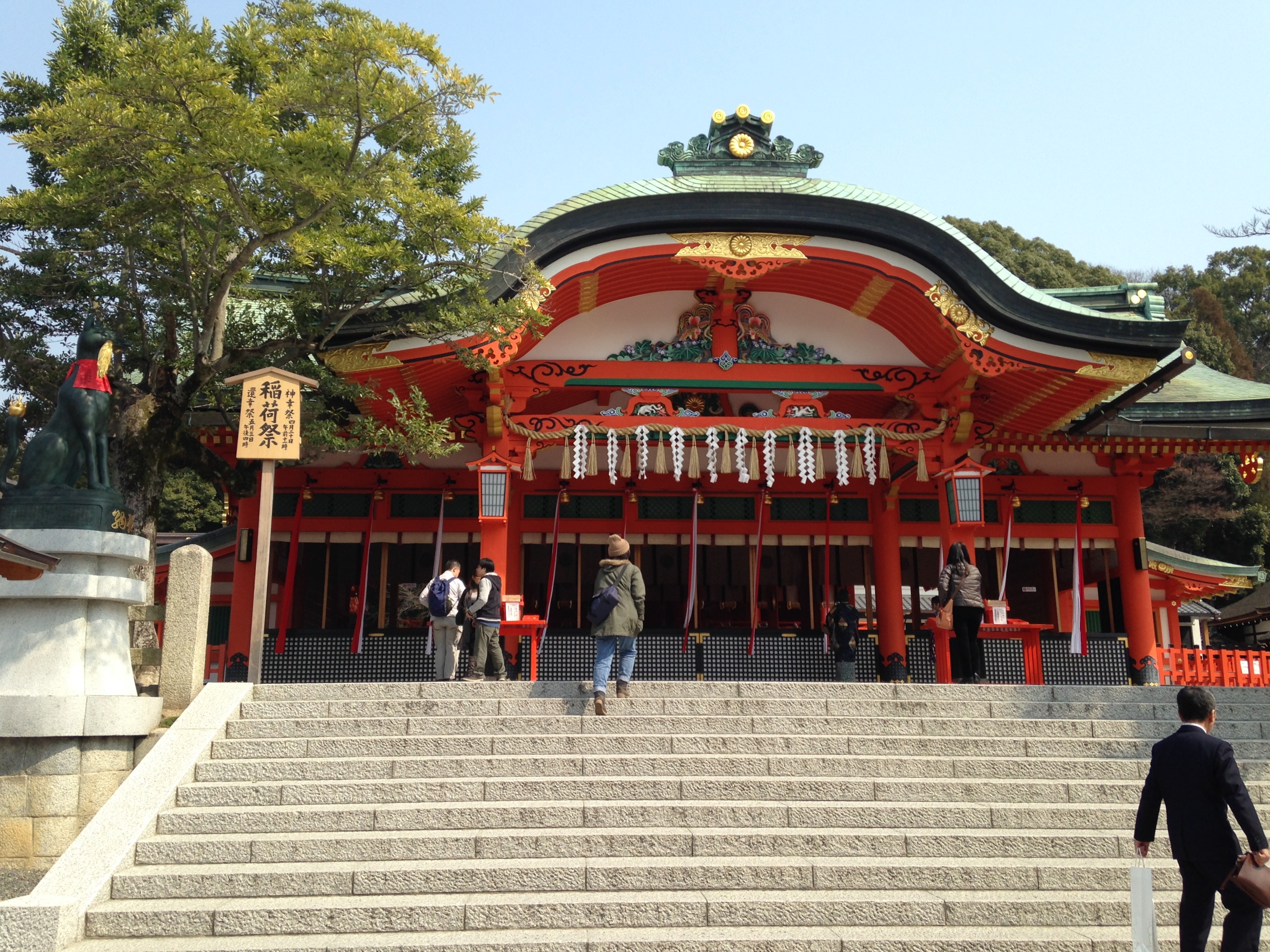 伏見稲荷大社・内拝殿